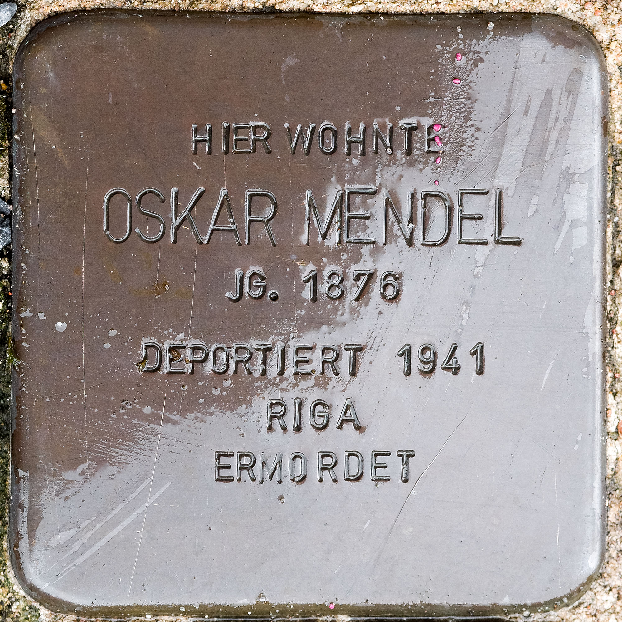 Stolpersteine Straelen: Mendel, Oskar